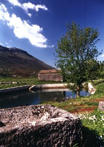 Monti Ausoni (Vallecorsa)